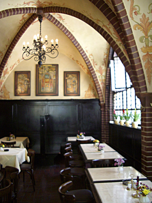 Kreuzgewölbe im Innenraum der Berliner Gerichtslaube. Dieser Raum befindet sich im Erdgeschoss.